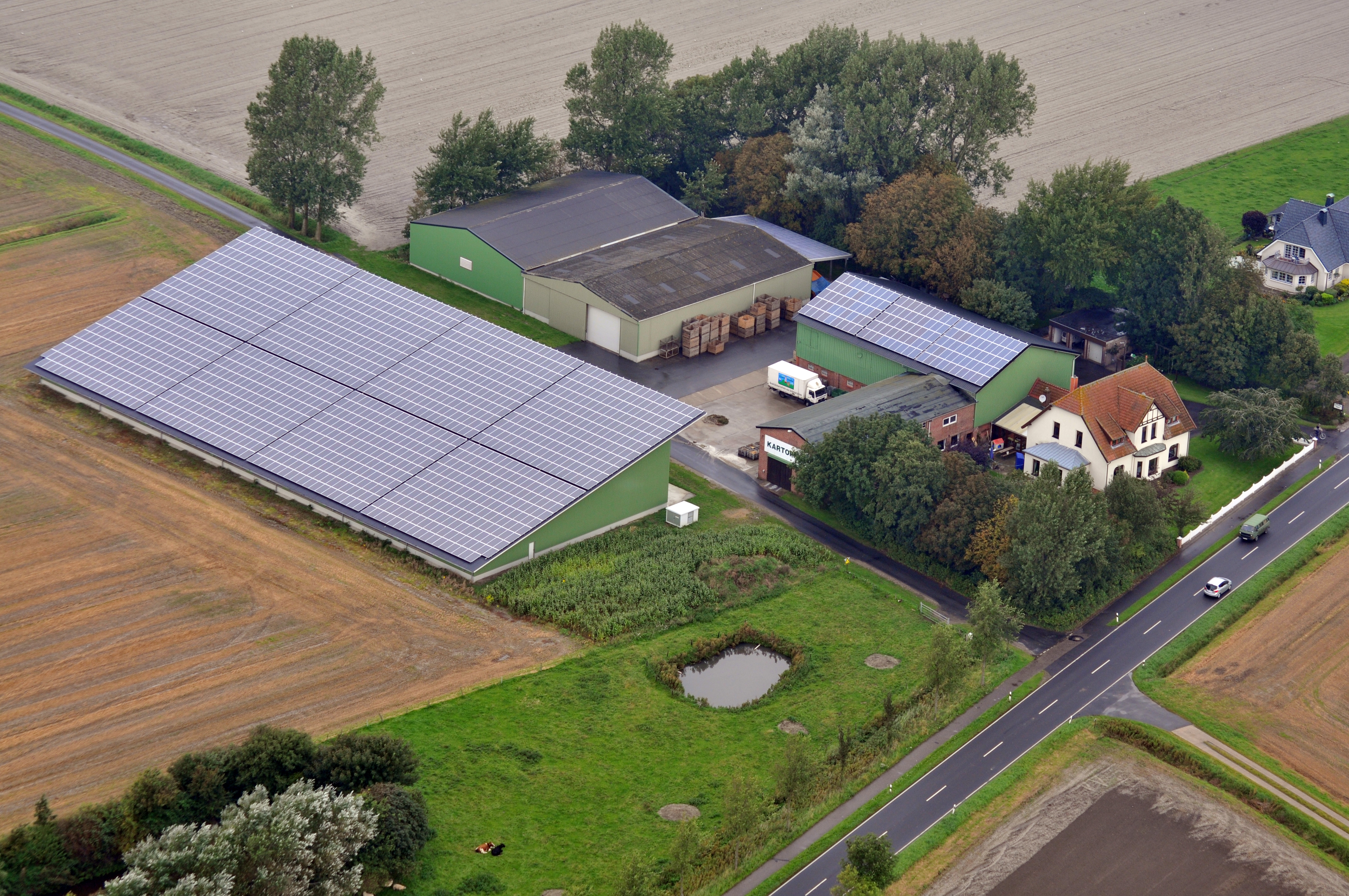 Fotoflug 4. Sept. 2011; Reinsbüttel-Wahrdamm, Kreis Dithmarschen, Schleswig-Holstein, Deutschland Dieses Foto entstand aufgrund eines Projektes, das von Wikimedia Deutschland e. V. gefördert wurde. Im Rahmen des „Community-Projektbudgets“ sollen Luftbilder u.a. von Inseln, Halligen, Sanden und Küstenorten der deutschen Nordseeküste angefertigt werden. Das Projekt „Fotoflüge“ wurde im September 2011 begonnen.